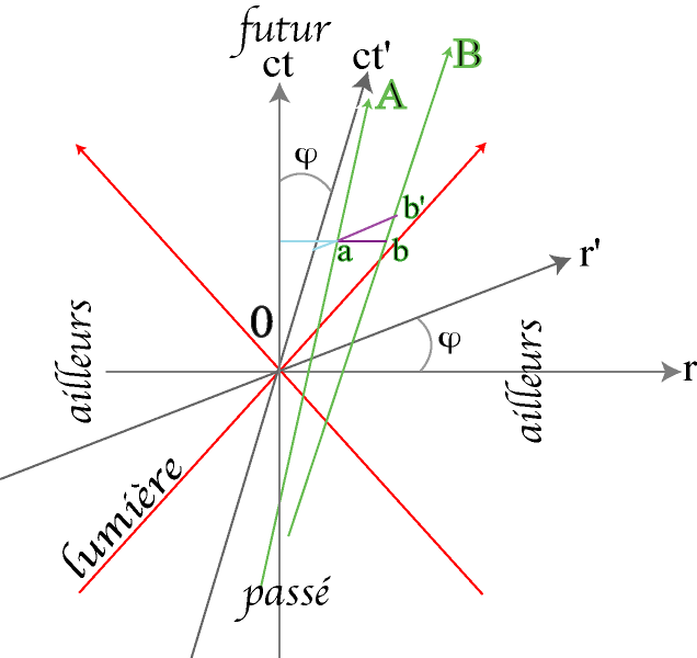 Relativité restreinte : Mesures de distances entre objets mobiles. Description de l'image : schéma explicatif de la géométrie espace-temps pour deux observateurs mobiles, voulant mesurer des distances entre objet mobiles. Importance de la notion de simultanéité. Source : créée à l'occasion de la rédaction de l'article Simultanéité. Statut : Licence de documentation libre GNU (GFDL : GNU Free Documentation Licence).